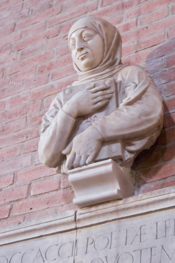 Certaldo, Chiesa dei SS. Iacopo e Filippo. Cenotafio di Boccaccio con un busto di marmo scolpito da Giovan Francesco Rustici, commissionato nel 1503 dal Vicario Lattanzio Tedaldi, collocato sopra l'epitaffio dettato dall'umanista Coluccio Salutati. Foto scattata da Pavek, che ne detiene il copyright.